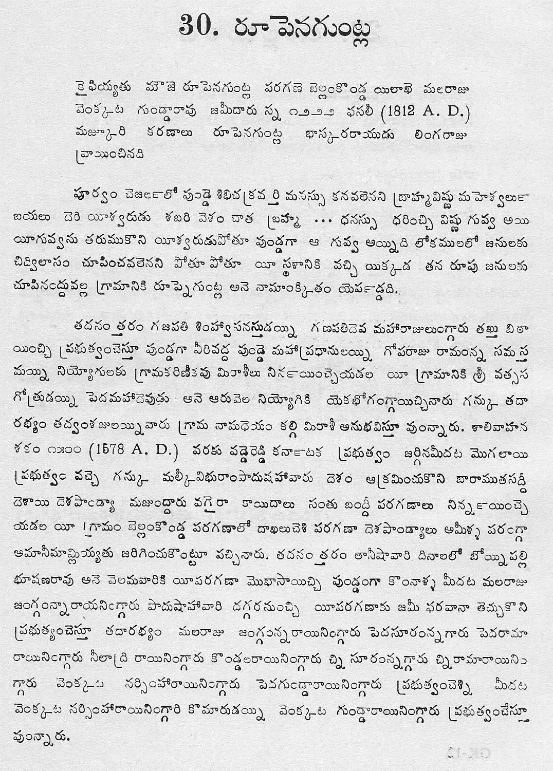 Rupenguntla Kaifiyat Page-1